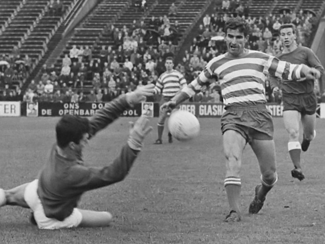 Voetbalwedstrijd Xerxes - Alkmaar te Rotterdam: 1-0. Radovic en keeper Dronkers (Alkmaar) 31 oktober 1965